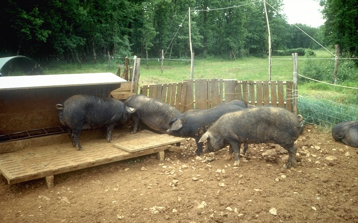 Caylus (Tarn-et-Garonne, France) : Porcs gascons en expérimentation (École nationale vétérinaire de Toulouse) en élevage dans la forêt de Caylus. Alimentation au nourrisseur avec essai de contrôle de la prise alimentaire en agissant sur le lest cellulosique de la ration.